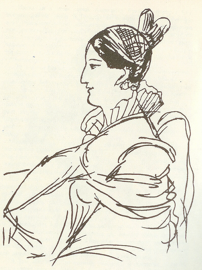 Дарья Федоровна Фикельмон (1804–1863)?